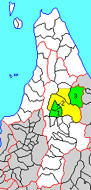 北海道上川郡（天塩国）の位置。